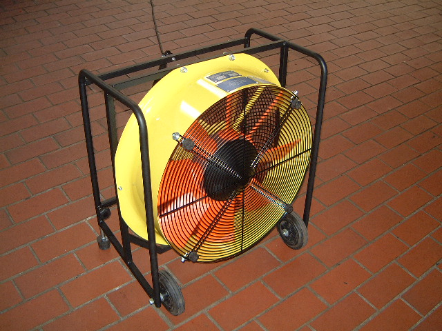 Druck- und Sauglüfter der Firma Häder